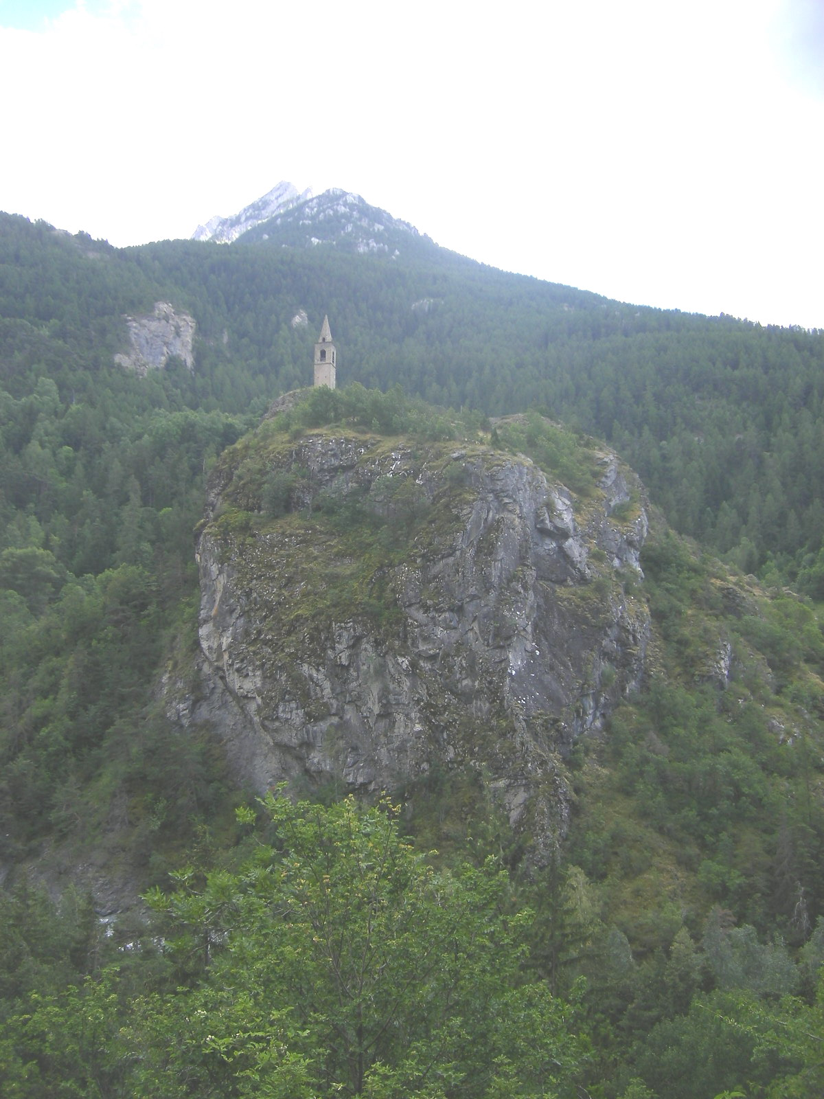 Les Thuiles